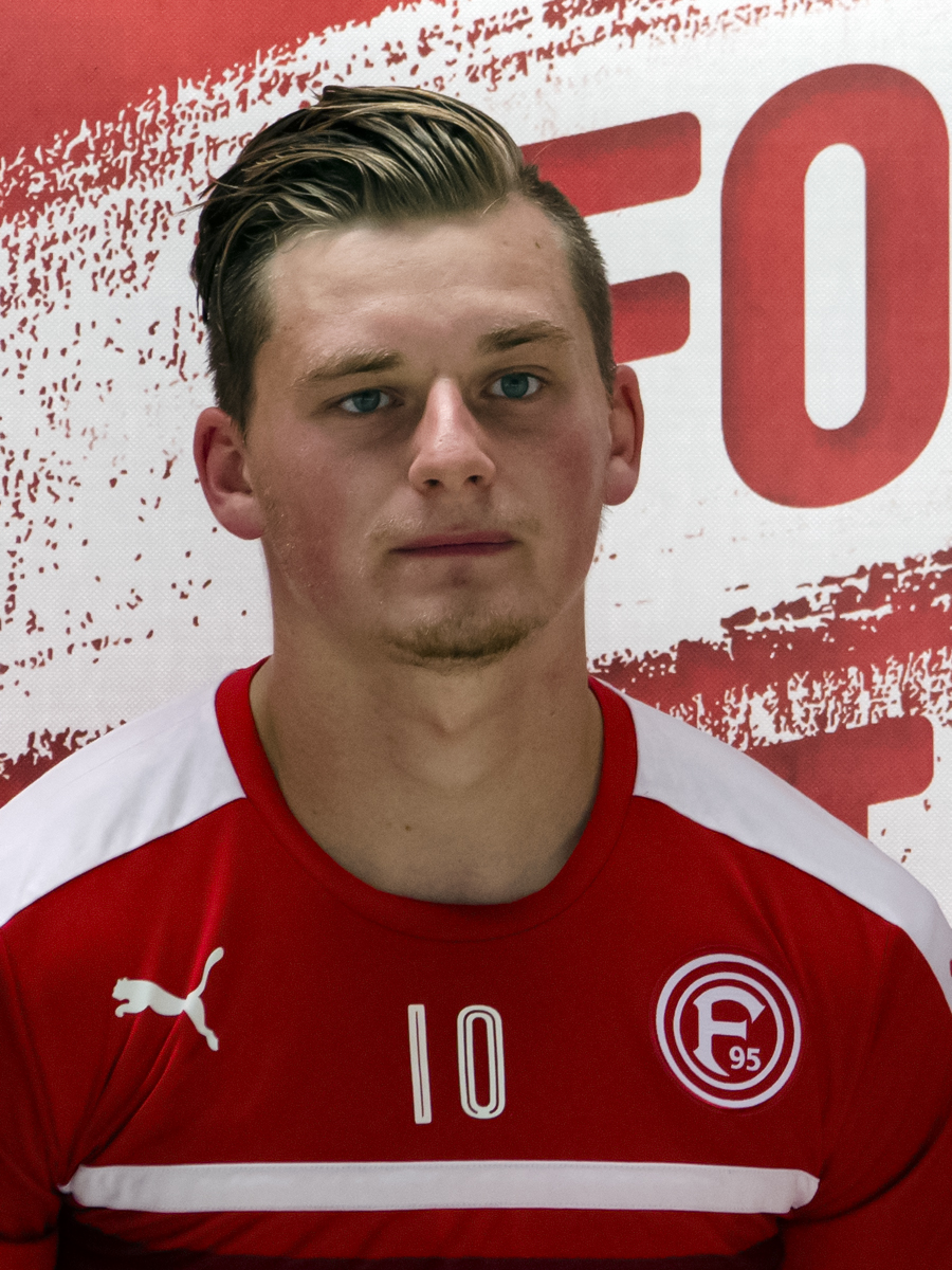 Marlon Ritter, Fußballspieler bei Fortuna Düsseldorf (2016)